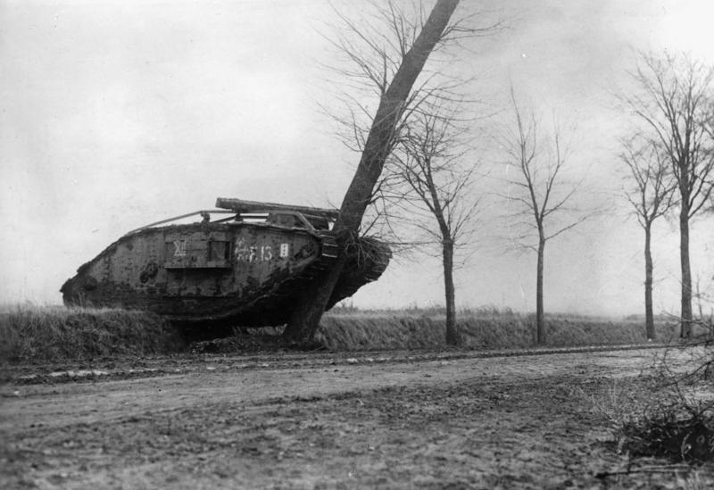 Tankschlacht bei Cambrai ADN-ZB-Archiv I. Weltkrieg 1914 - 1918; Westfront: Die Tankschlacht der Engländer bei Cambrai vom 20. bis 29. November 1917. U.B.z.: ein englischer Tank bricht auf dem Vormarsch einen Straßenbaum um. 115-18 [Scherl Bilderdienst]